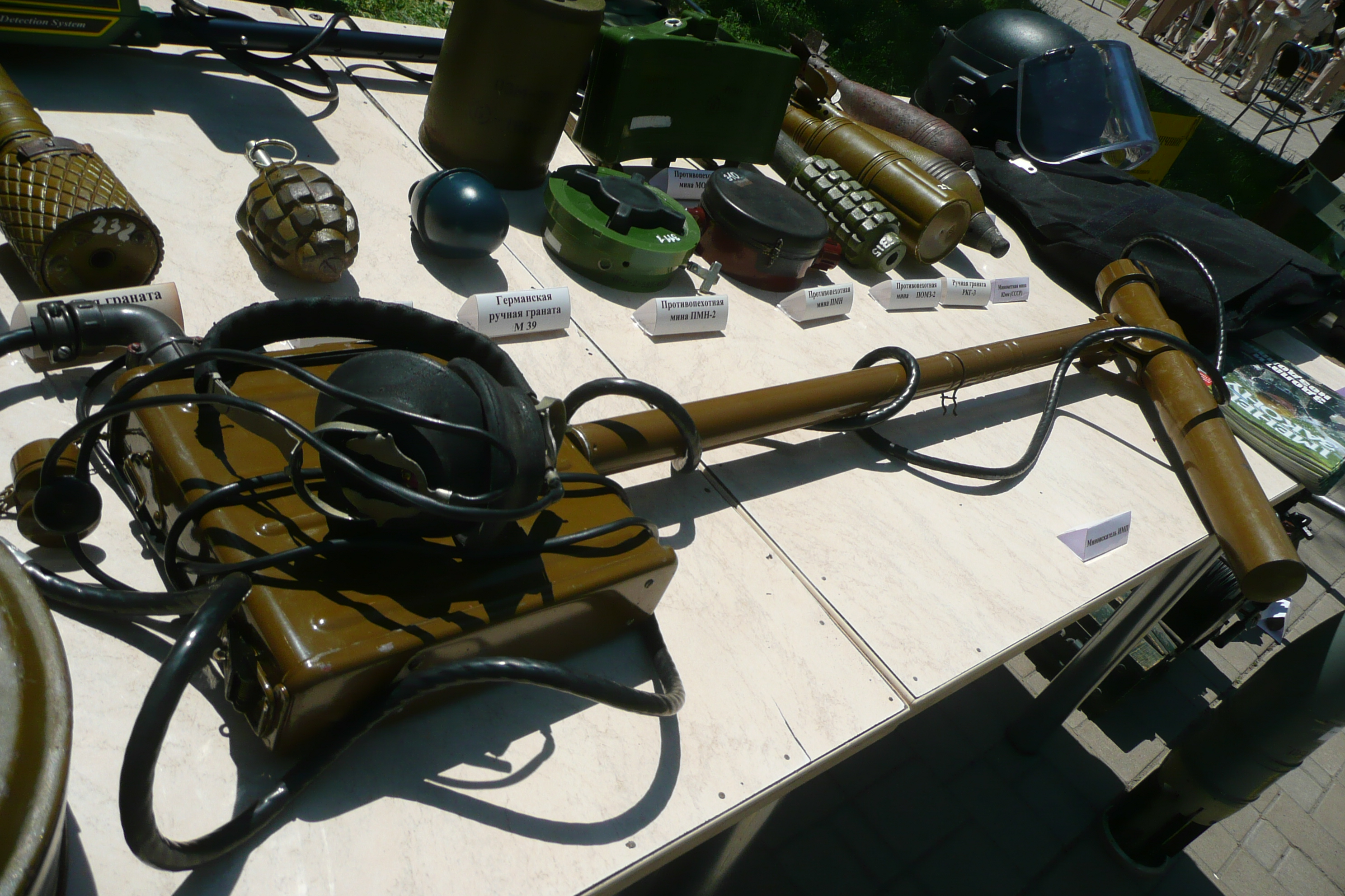 День защиты детей в Донецке